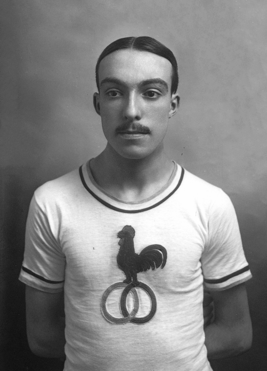 Vignaud [portrait du coureur] : [photographie de presse] / [Agence Rol]